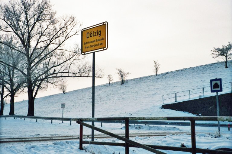 Elster-Saale-Kanal bei Dölzig